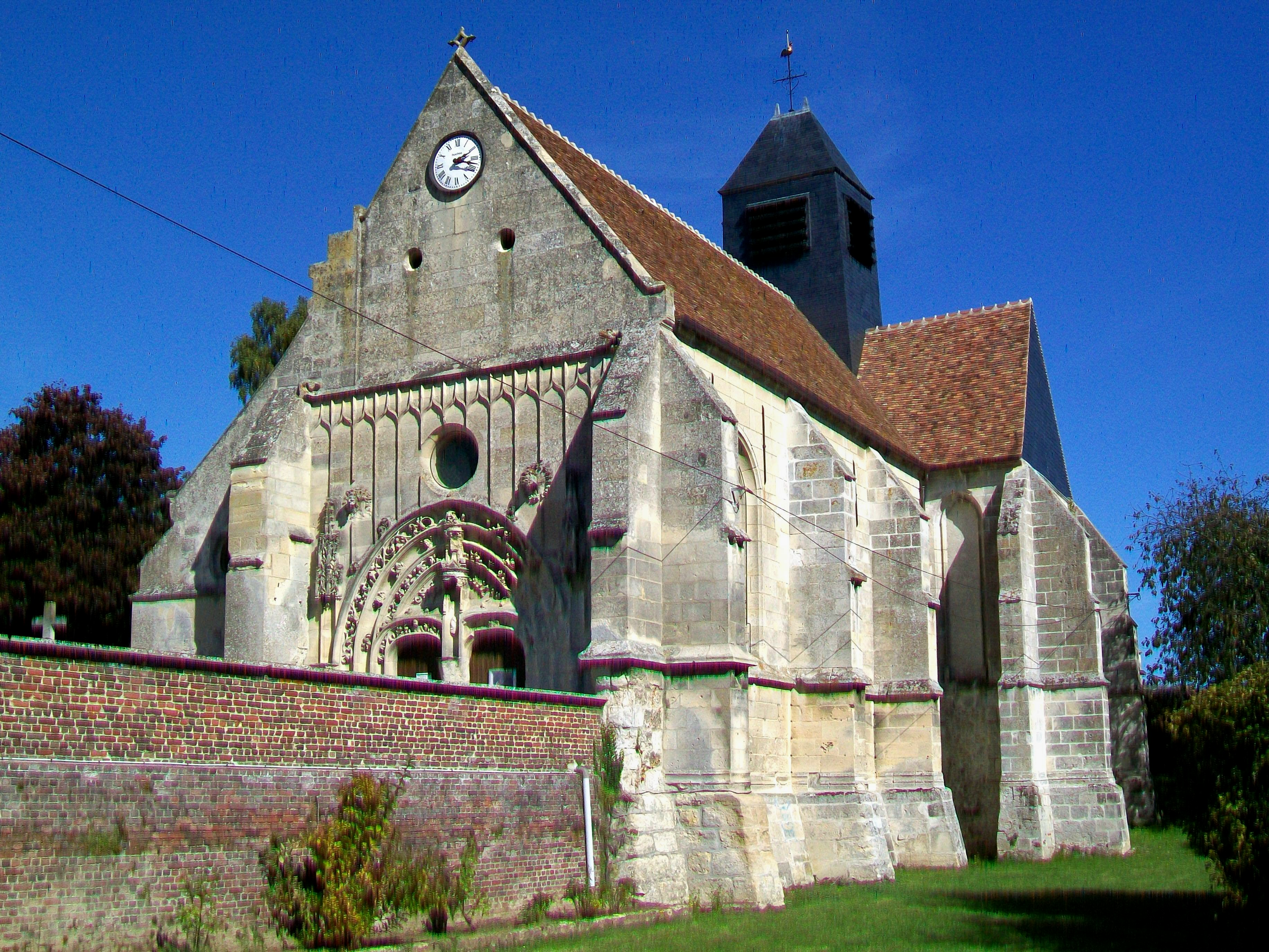 Vue d'ensemble de l'église depuis le sud-ouest.